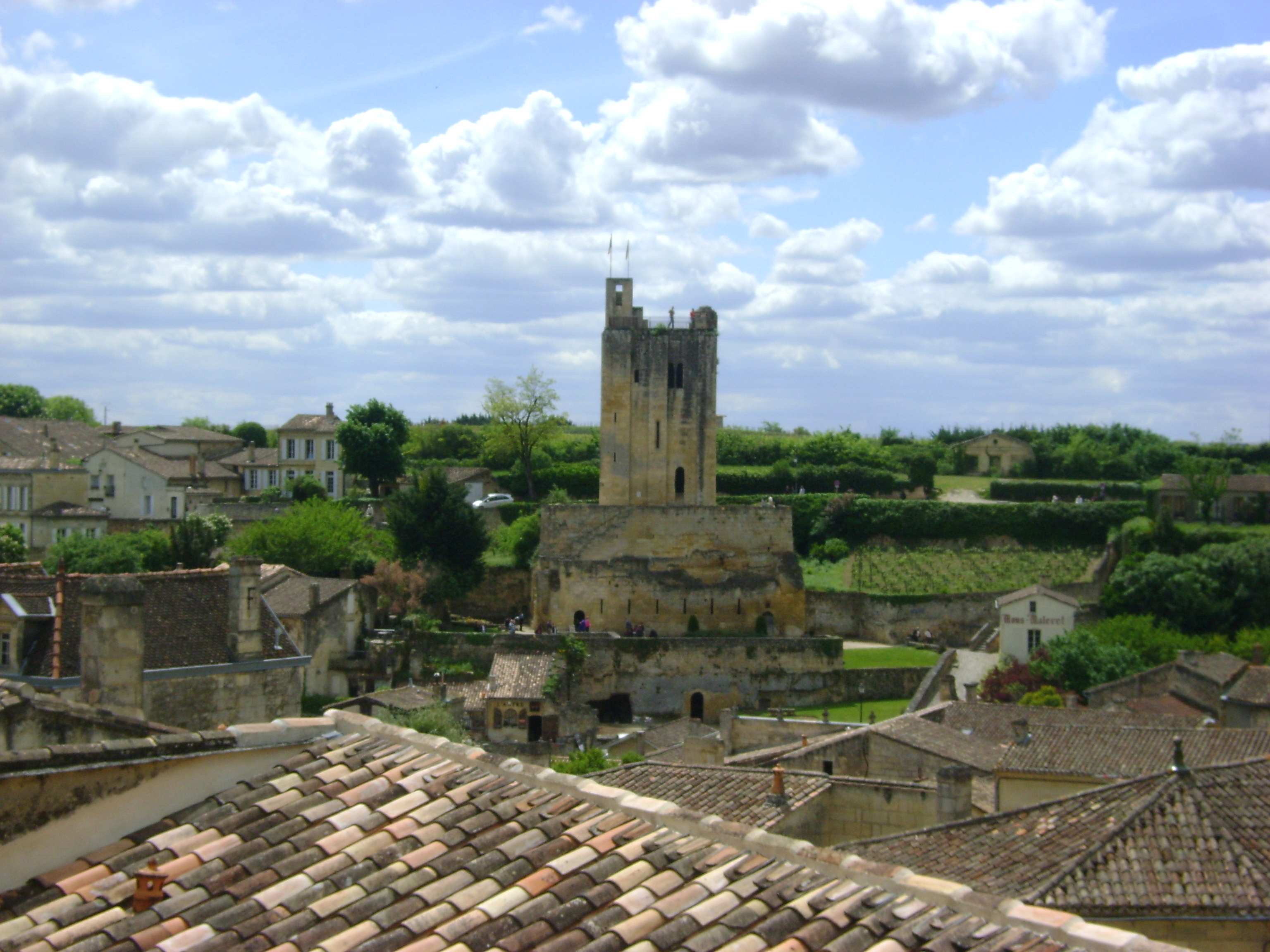 Le Château du Roi à Saint-Emilion, Gironde. .